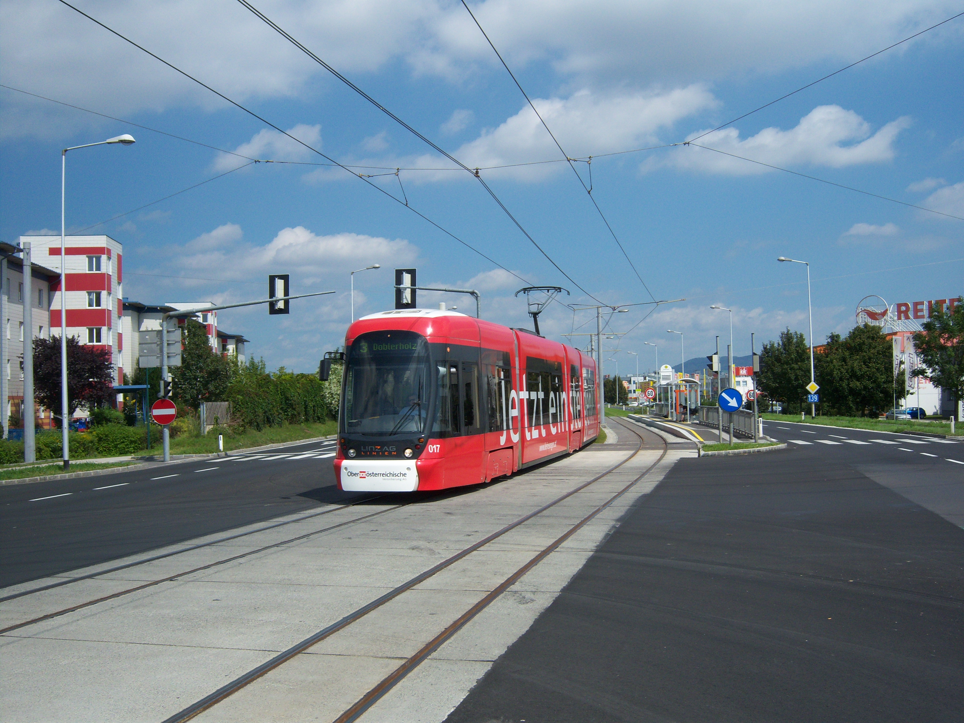 Straßenbahnlinie 3 (Linz–Leonding) in ihrer stadtauswärtigen Endstelle Doblerholz